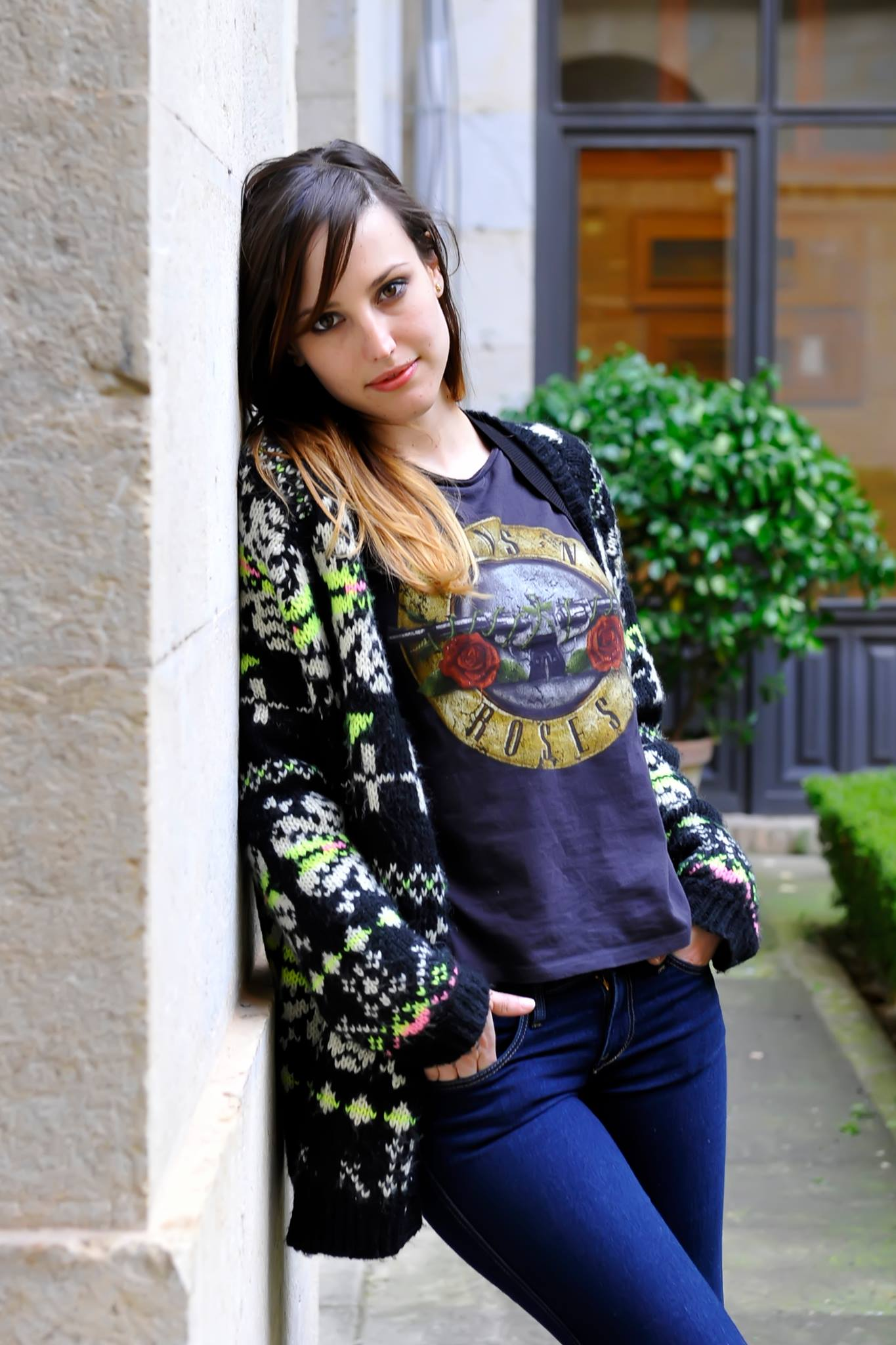 Natalia de Molina en Jaén, su provincia natal.